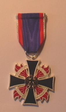 Feuerwehrehrenkreuz DFV in Silber